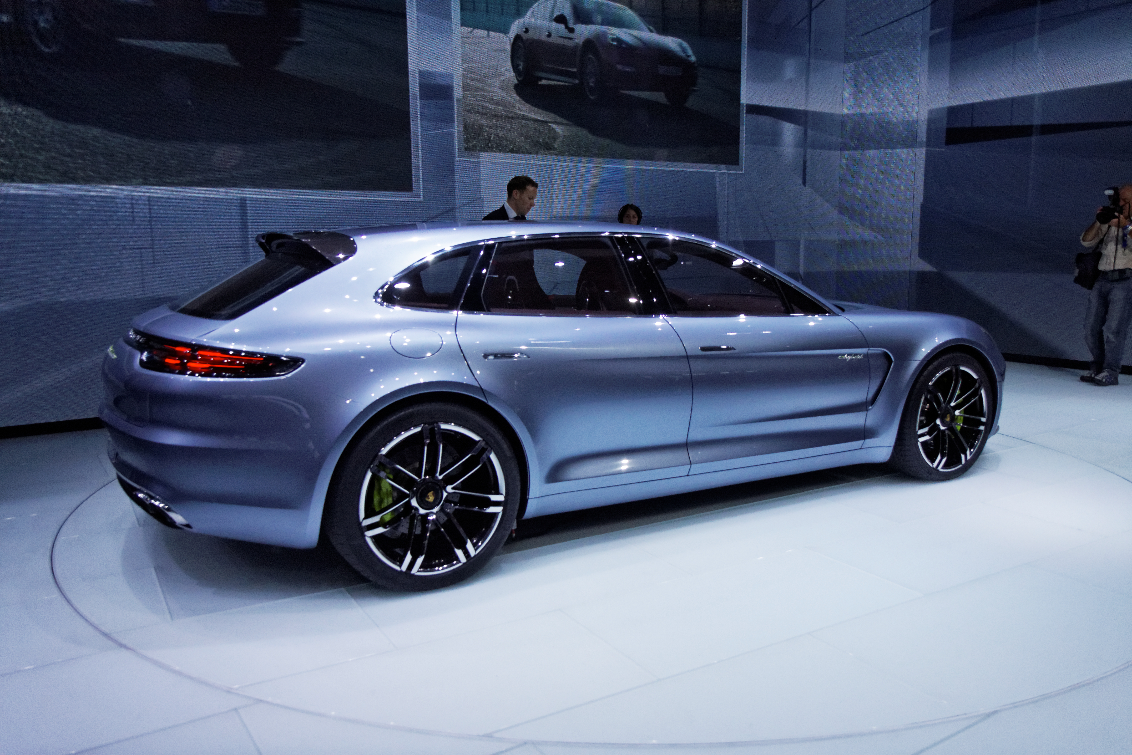 une Porsche Panamera Sport Turismo e-hybrid présentée lors du Mondial de l'automobile de Paris 2012.